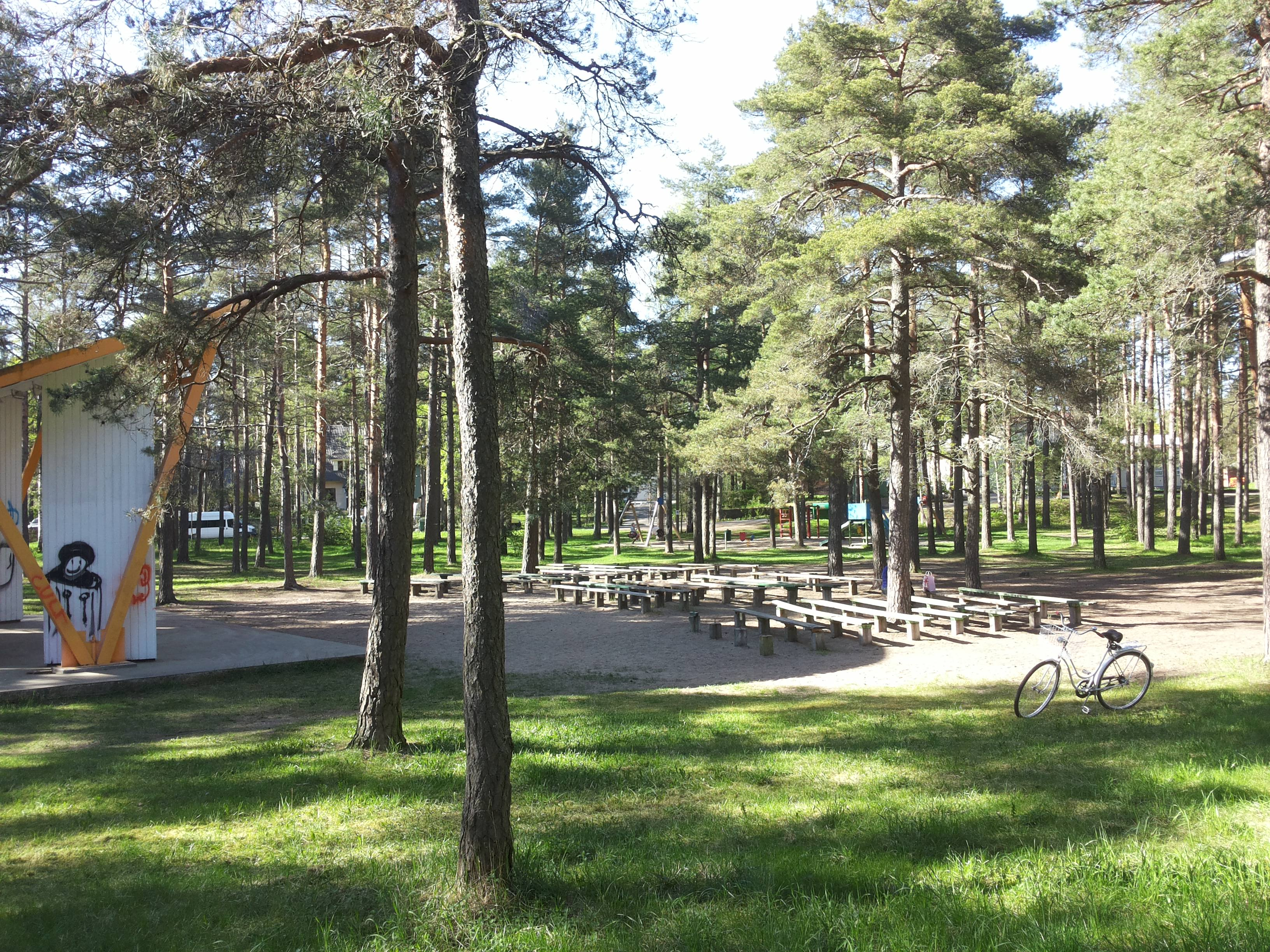 Vabaduse parkmets